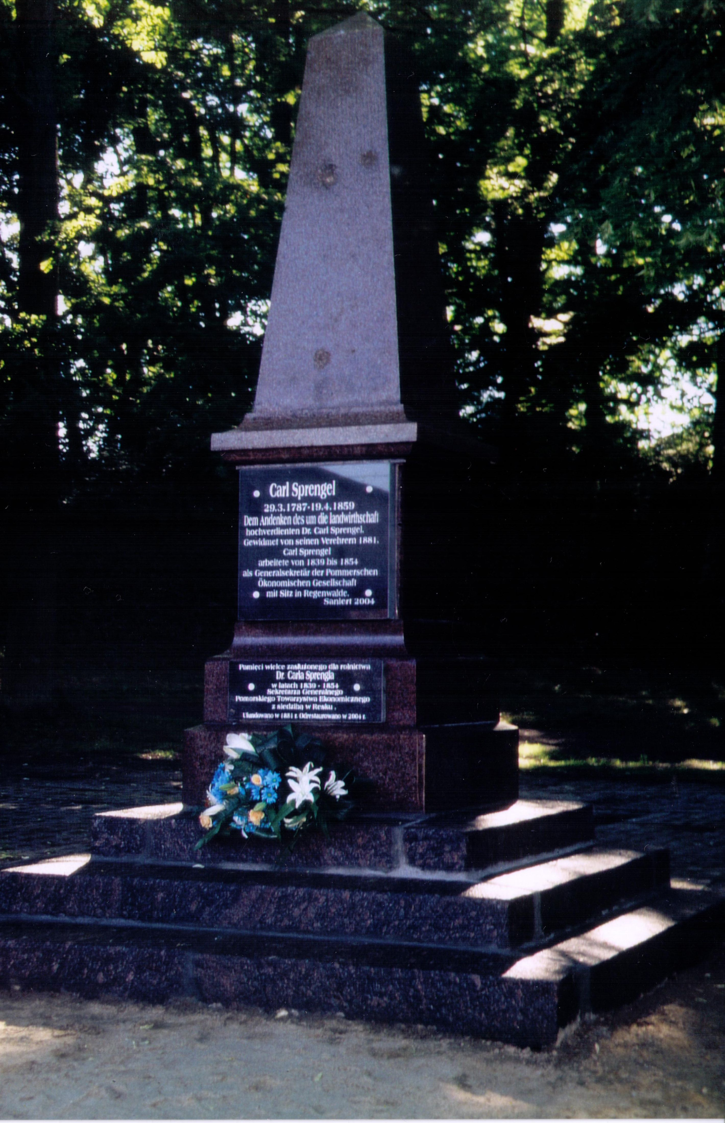 Denkmal für den Agrarwissenschaftler Carl Sprengel (1787–1859) in Regenwalde (heute Resko)